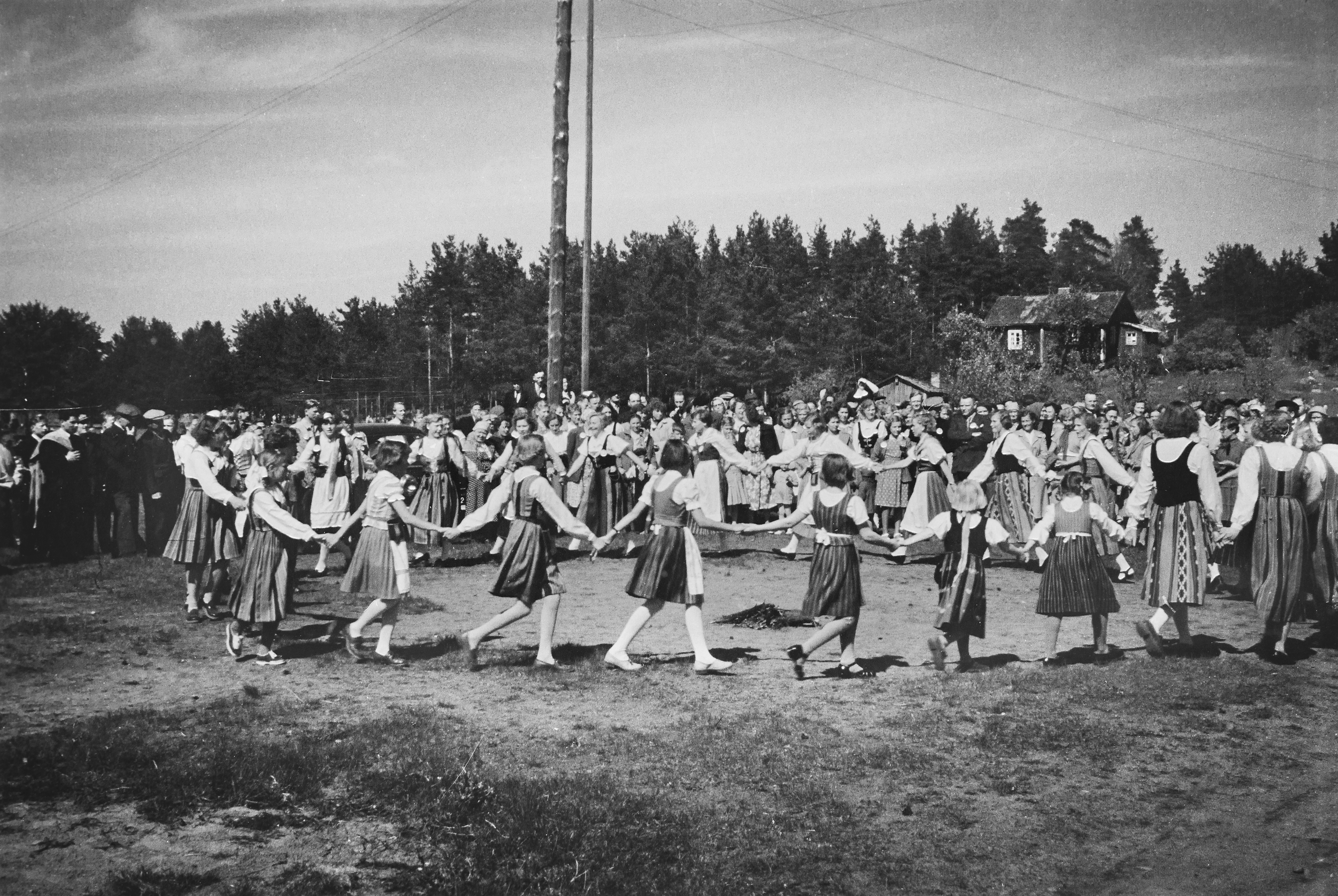 Ritvalan Helkajuhla 13.7.1945